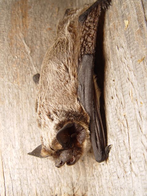 Parti-coloured Bat (Vespertilio murinus) German description: Zweifarbfledermaus (Vespertilio murinus)